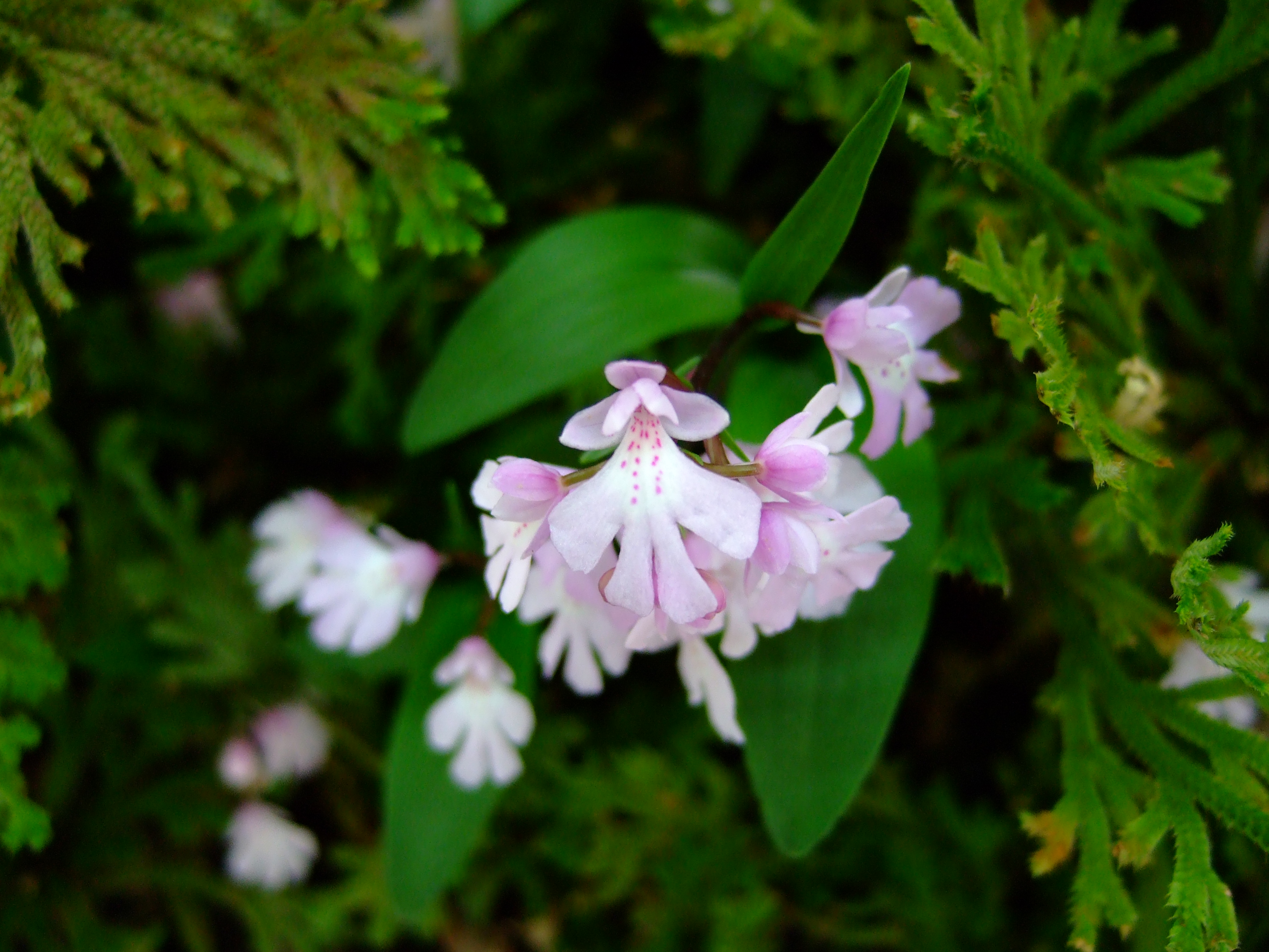 兵庫県立フラワーセンターイワチドリイワヒバ